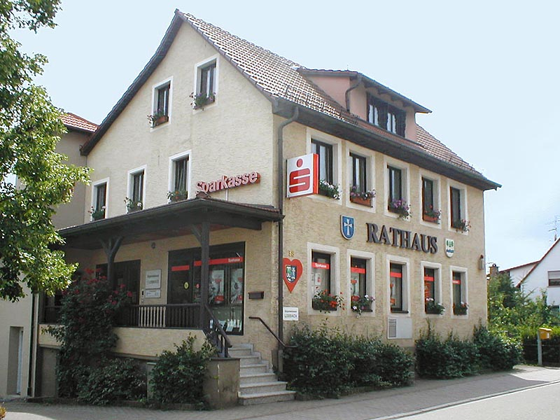 Rathaus in Waldwimmersbach